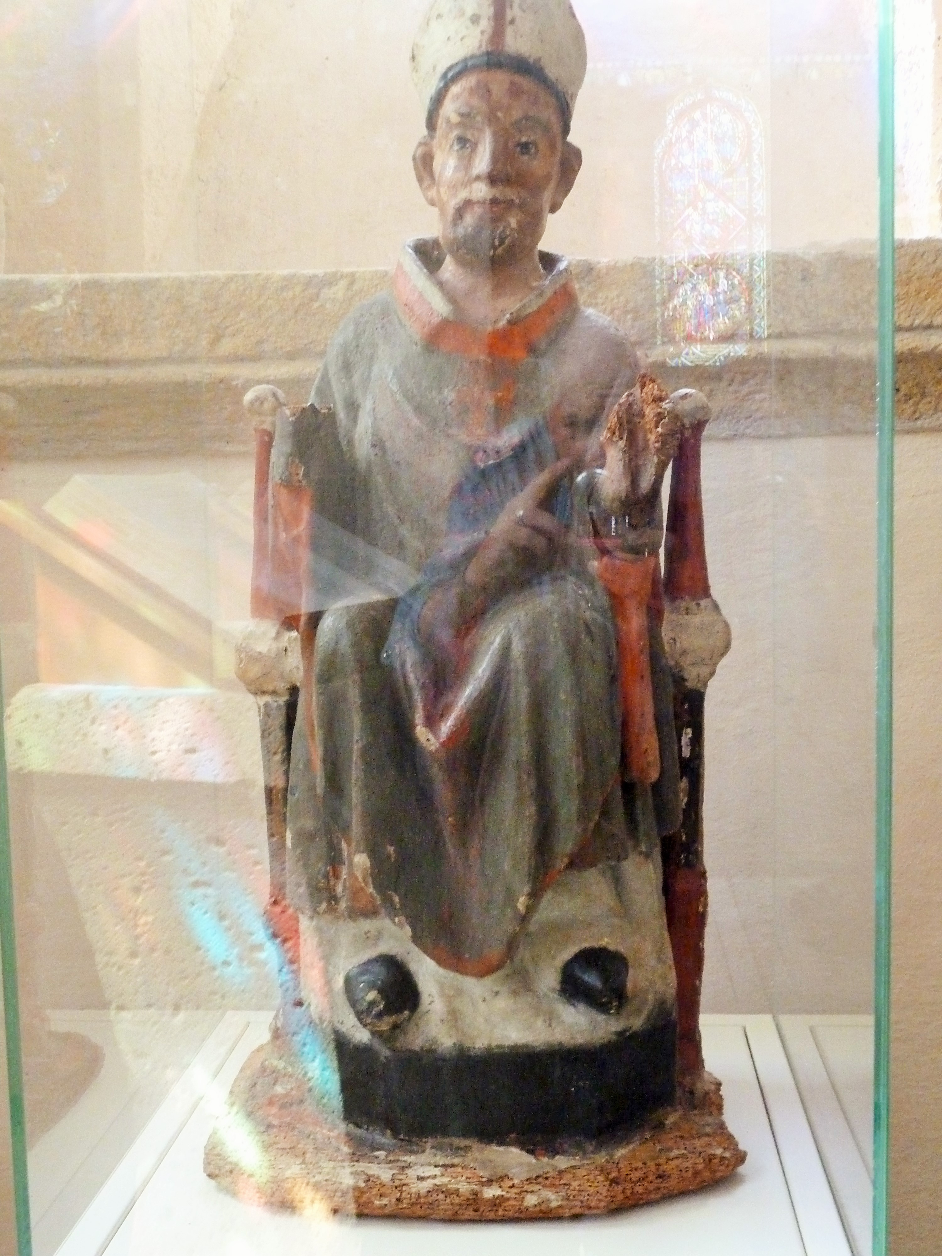 Le Église de Saint-Nectaire à Saint-Nectaire Puy-de-Dôme